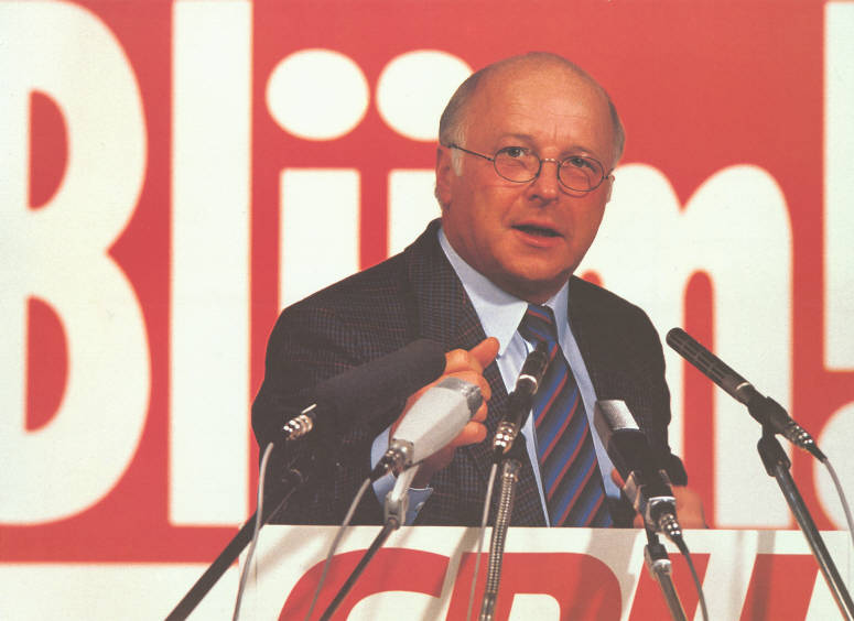 Blüm Abbildung: Blüm am Rednerpult vor Mikrofonen Plakatart: Kandidaten-/Personenplakat mit Porträt Objekt-Signatur: 10-009 : 1101 Bestand: Landtagswahlplakate Nordrhein-Westfalen (10-009) GliederungBestand10-18: Landtagswahlplakate Nordrhein-Westfalen (10-009) » CDU Lizenz: KAS/ACDP 10-009 : 1101 CC-BY-SA 3.0 DE